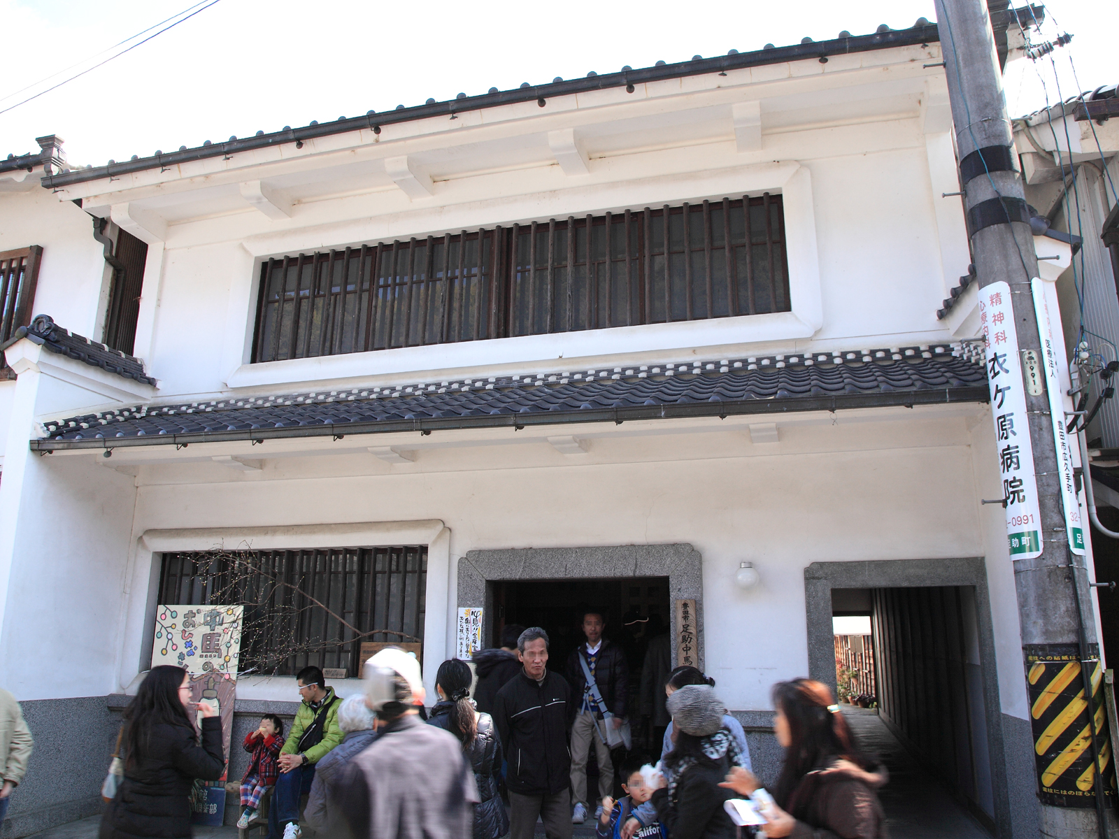 足助中馬館（豊田市足助町、2012年）